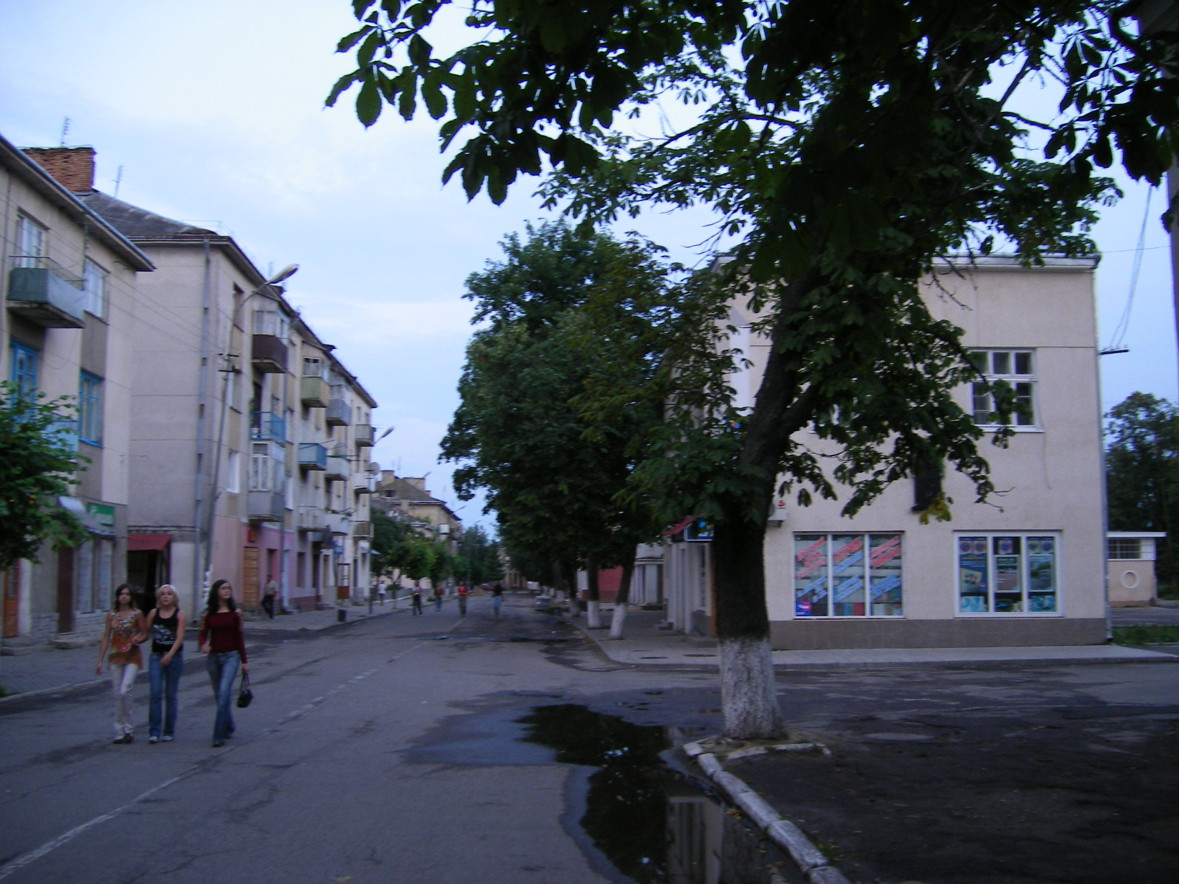 Kamyanka-Buzka